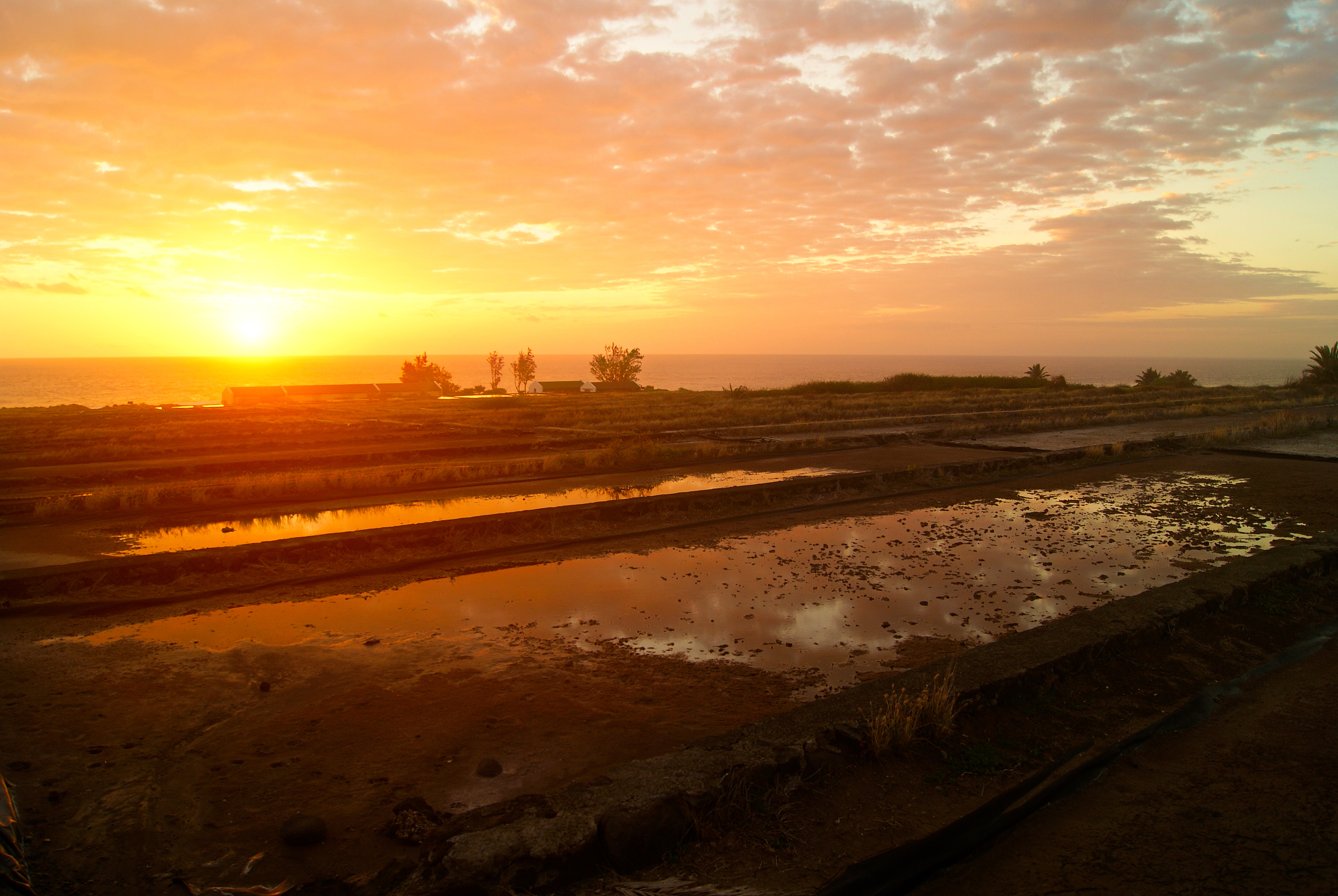 Soleil couchant Salines Saint Leu, Réunion